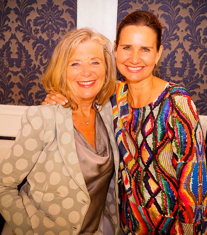 Sabina Bockemühl zusammen mit der Schauspielerin Jutta Speidel